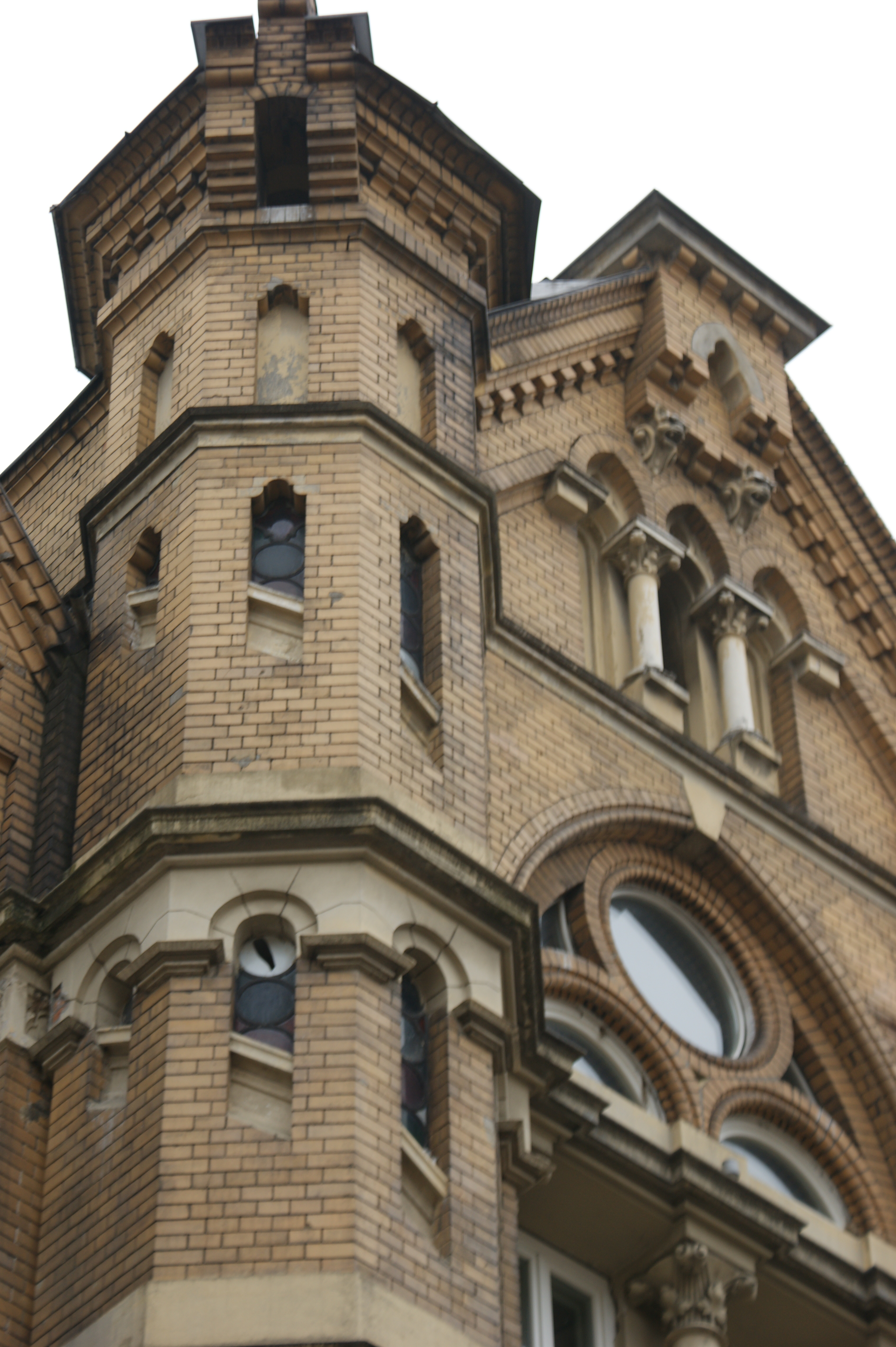 Wieżyczka Gmachu WTW